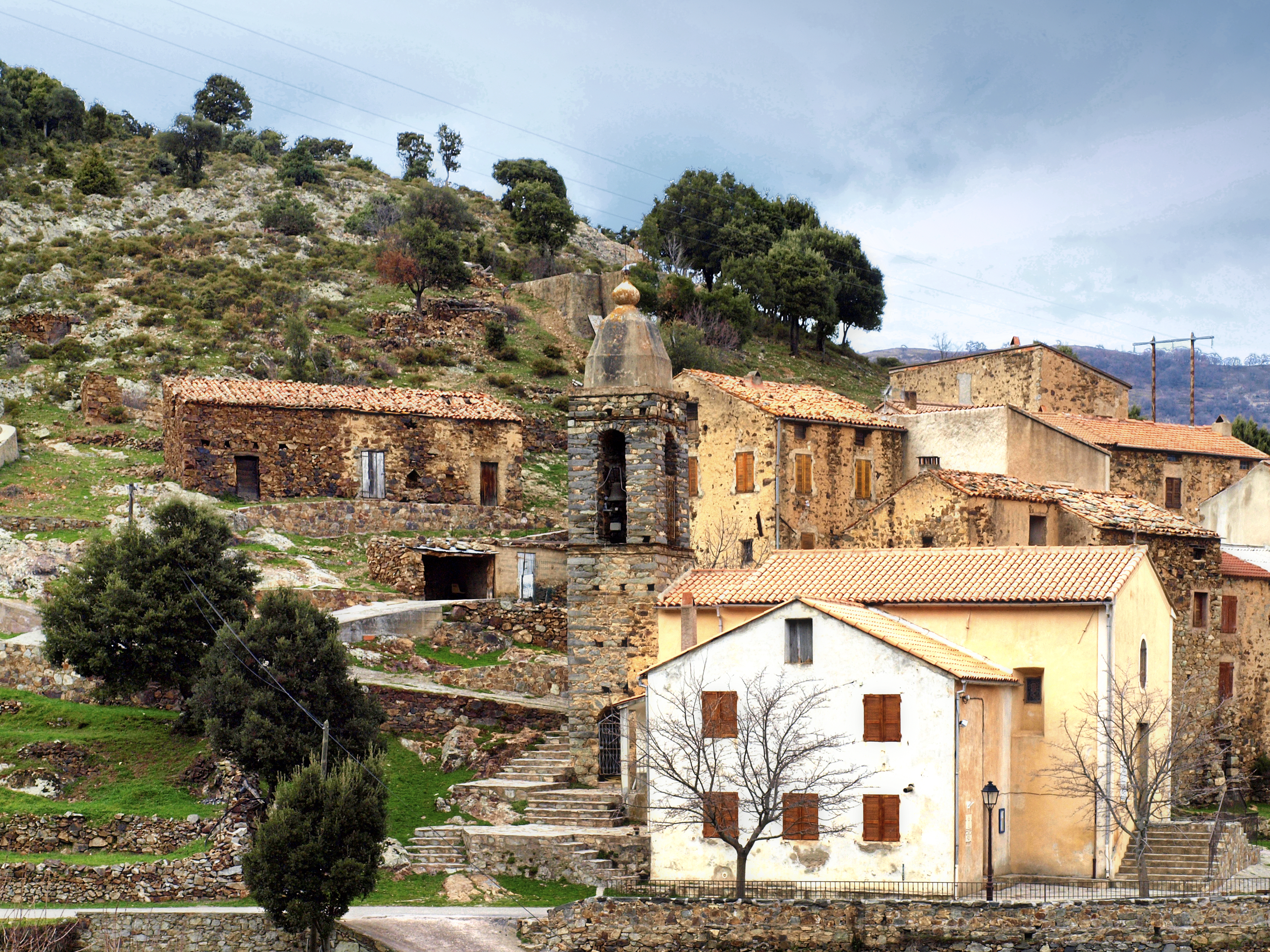 Mausoléo (Corsica) - Église San Salvadore